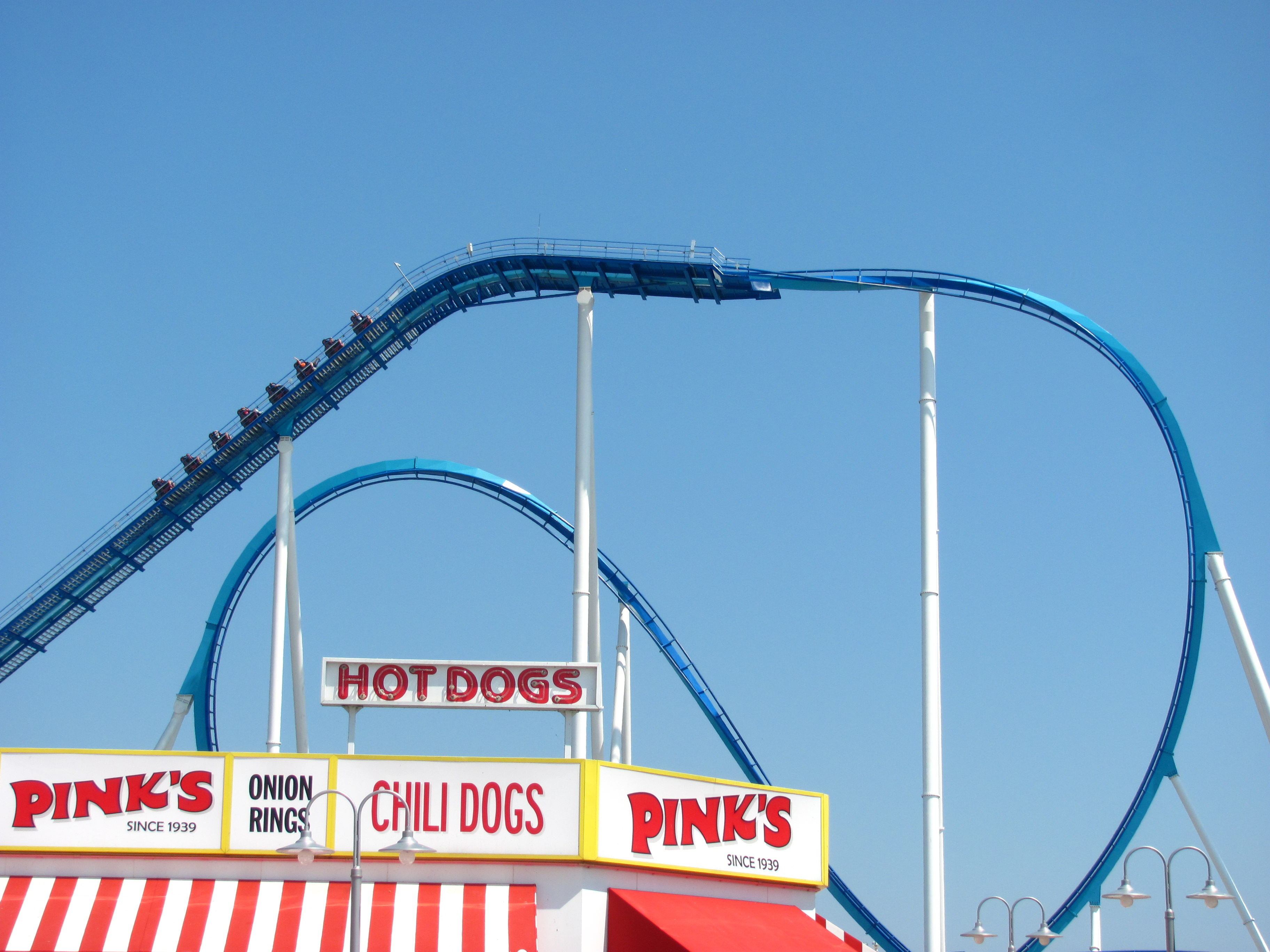 Cedar Point 049